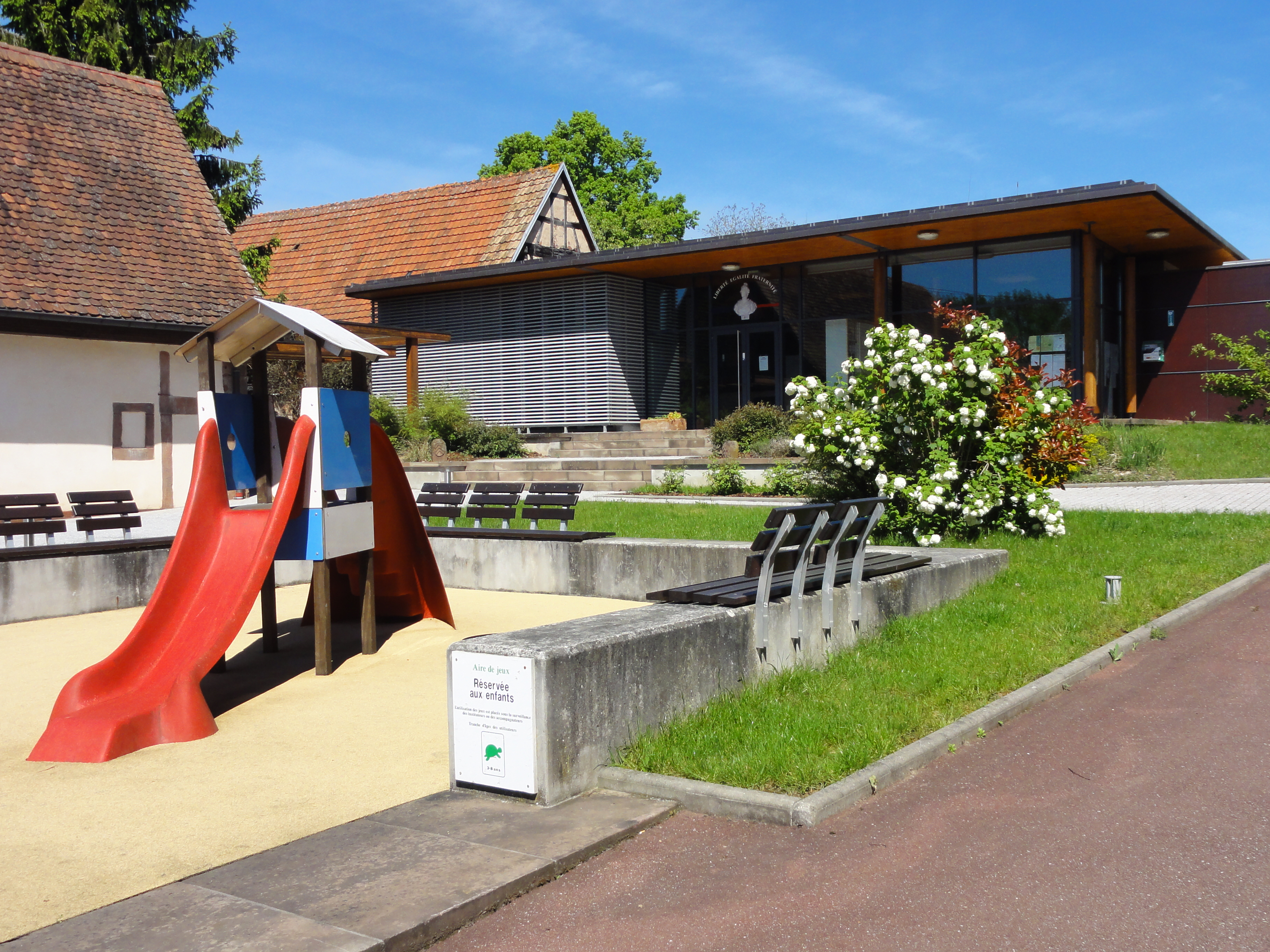 Alsace, Bas-Rhin, Niedersoultzbach, Nouvelle Mairie